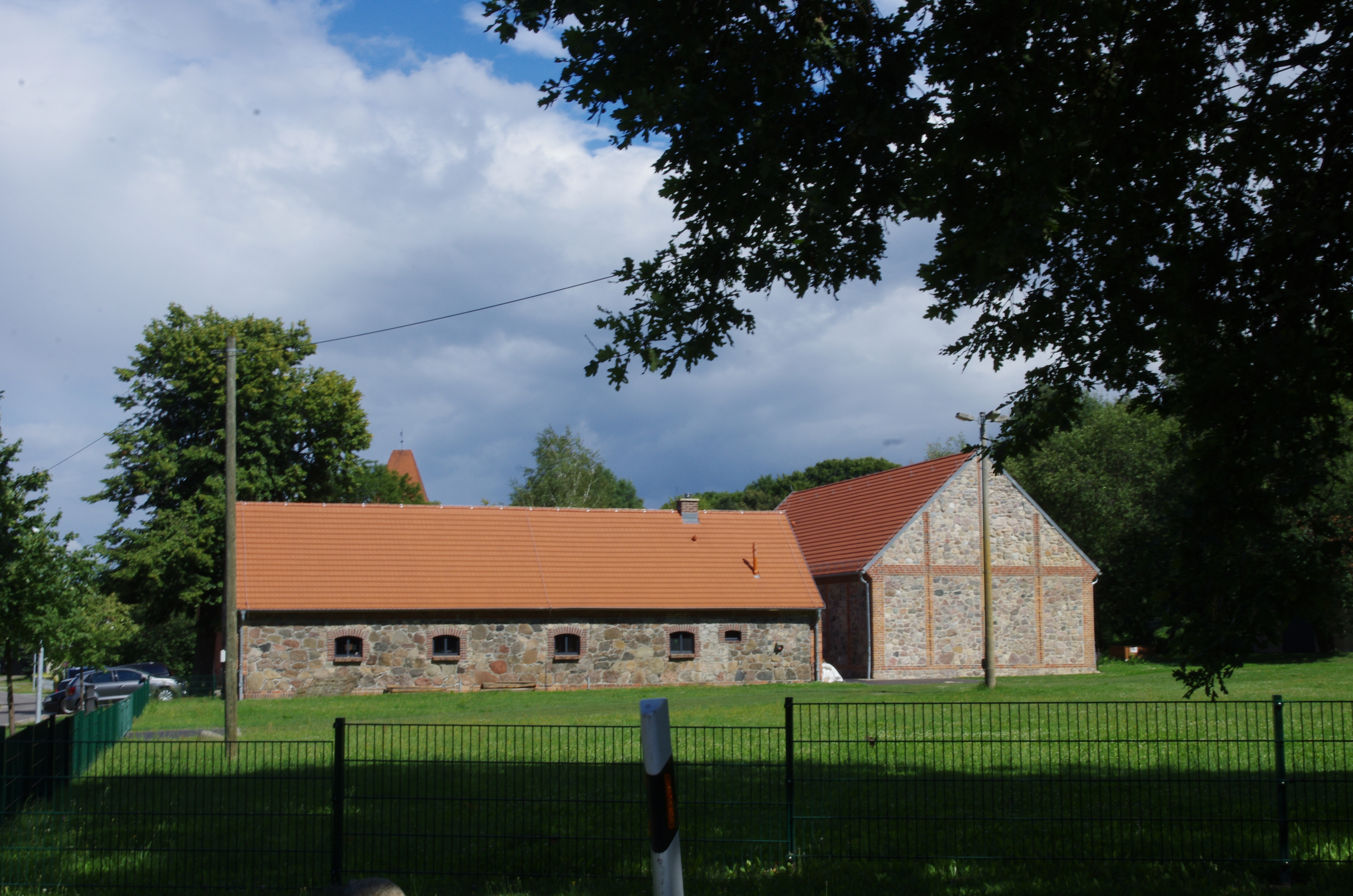 Drebkau in Brandenburg. Der Steinnitzhof ist ein Hotel in Steinitz.